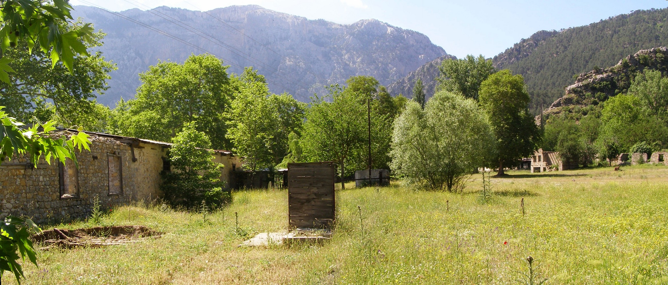 Belemedik'teki tarihi yapılar.